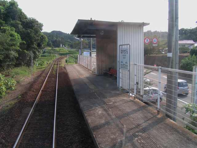 中田平駅 投稿者が撮影(2006/08/28)